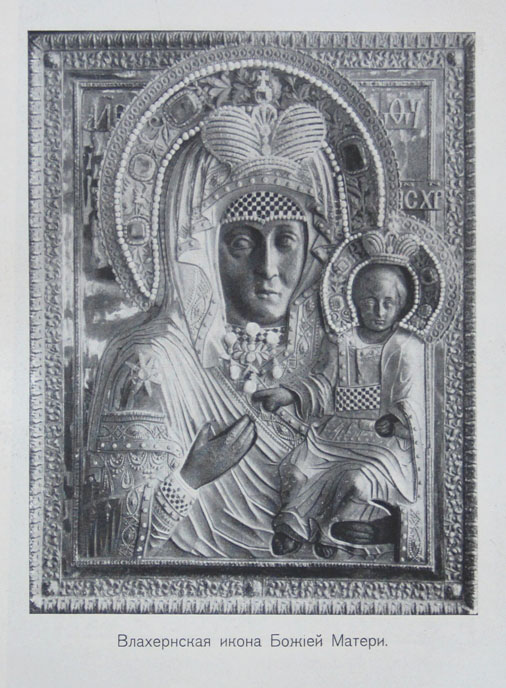 Влахернская икона Божей Матери (фото из книги Порецкого Н.А, изд.1913г.). Снято в Церкови Влахернской Богоматери в Кузьминках (ныне район Москвы).